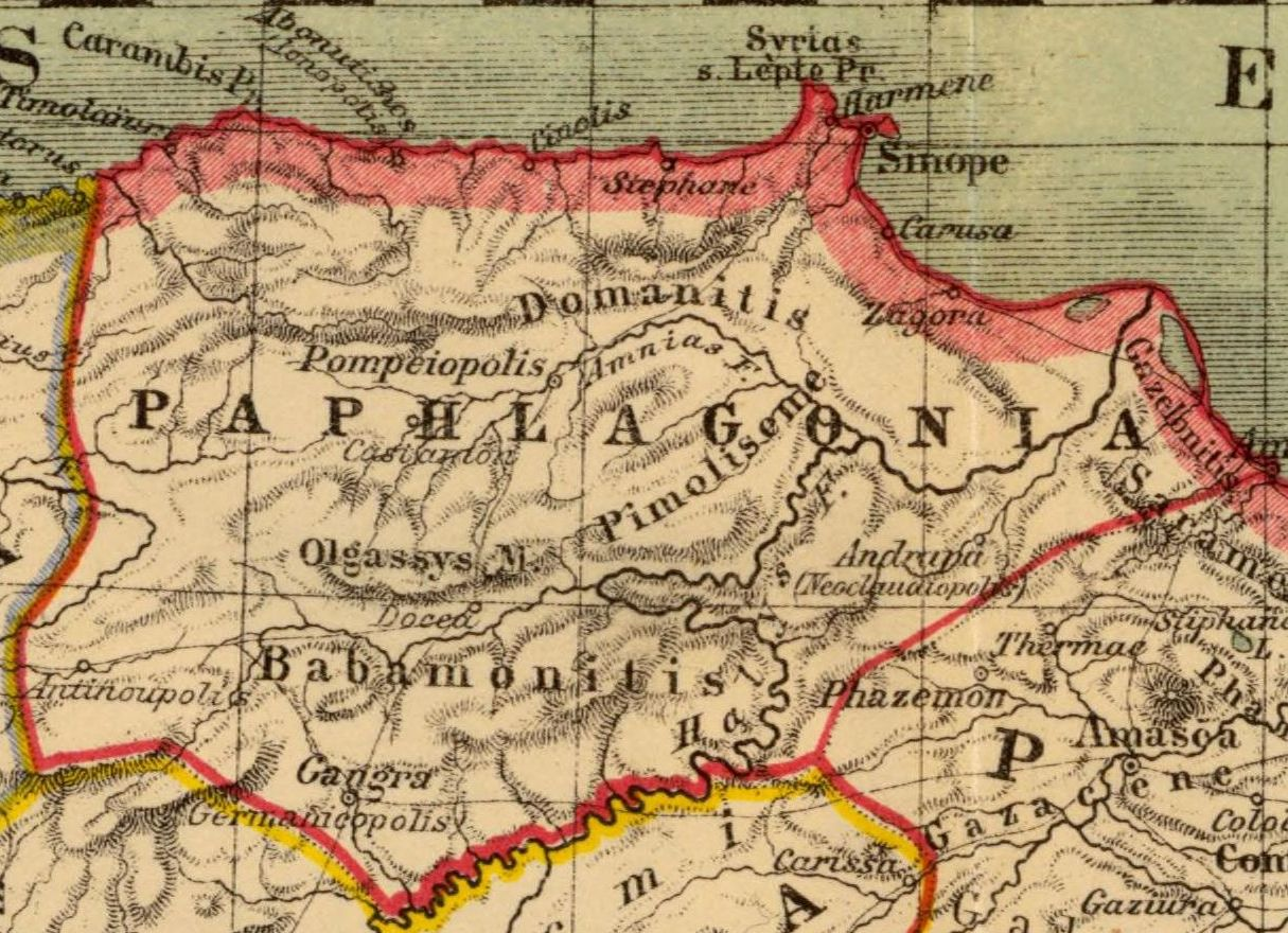 Paphlagonia. Asia citerior. Auctore Henrico Kiepert Berolinensi. Geographische Verlagshandlung Dietrich Reimer (Ernst Vohsen) Berlin, Wilhemlstr. 29. (1903)